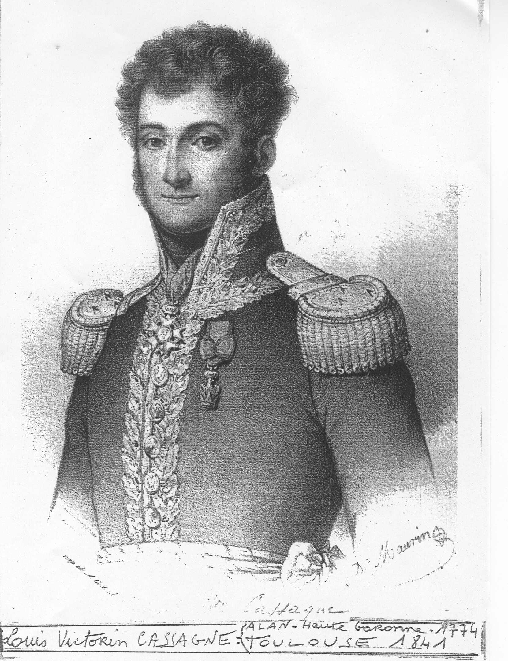 Général_Victorin-Louis_CASSAGNE